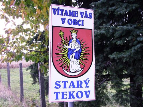 vitajte v starom tekove